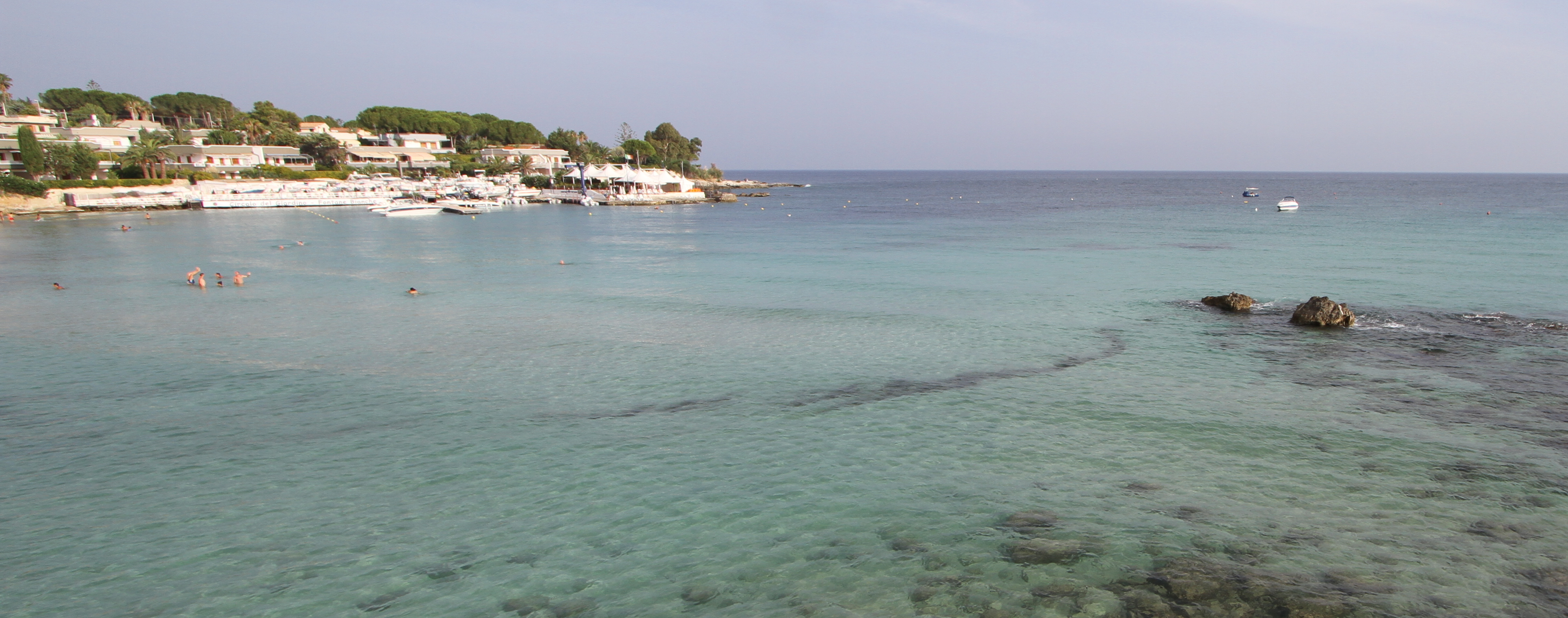 Siracusa: Fontane Bianche